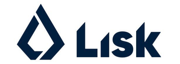 lisk logo 201802 リブランディング